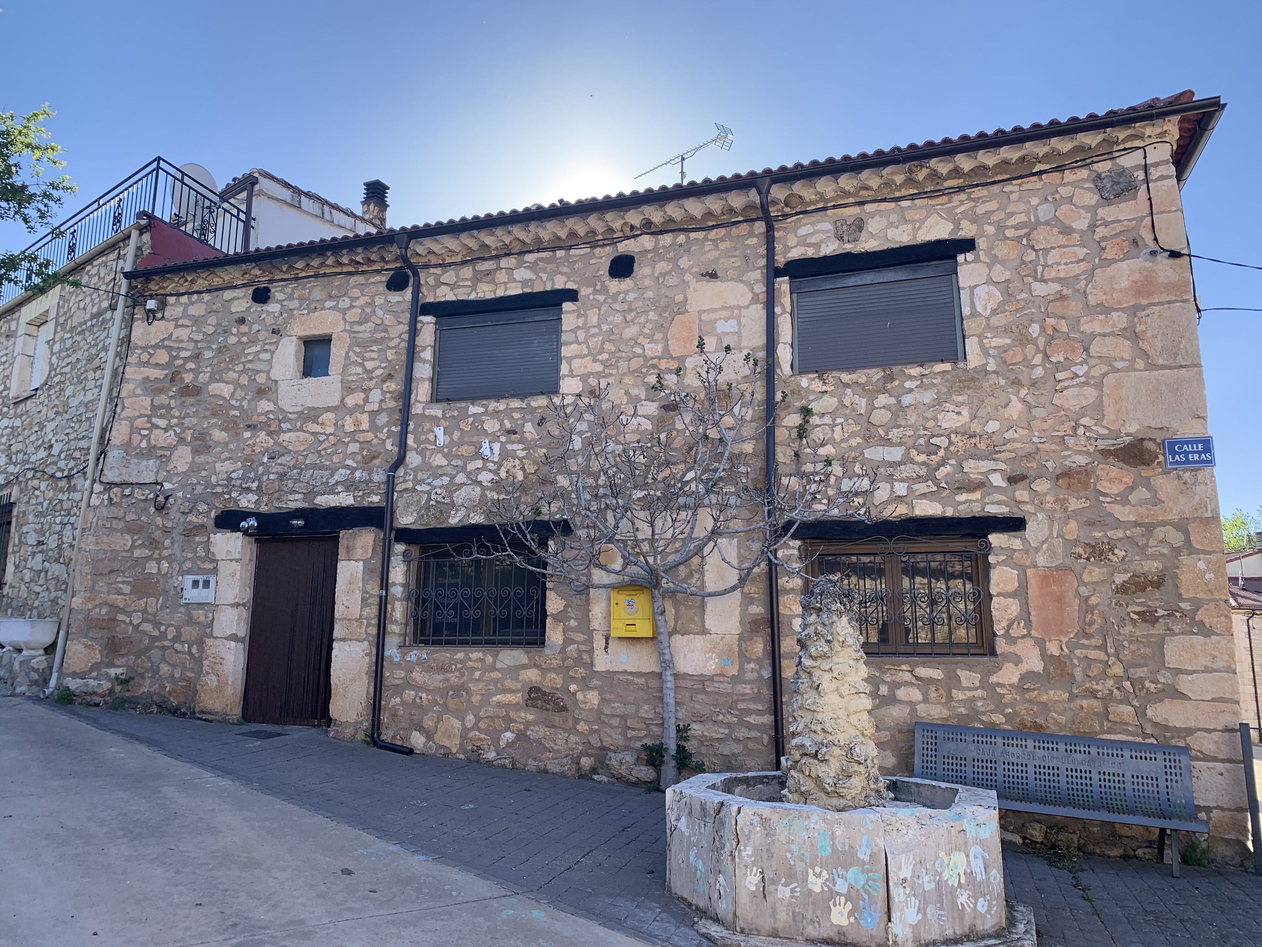 Ayuntamiento de Tejada